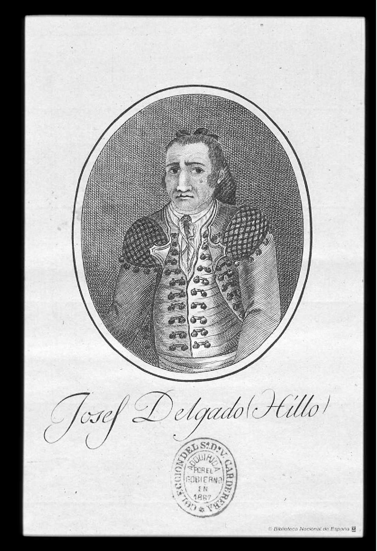 Retrato de Pepe Hillo